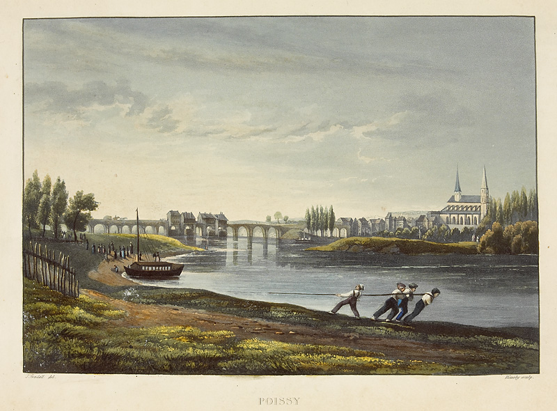 La galiote est tirée ; au fond, le pont de Poissy et ses moulins ; en ville, la collégiale.